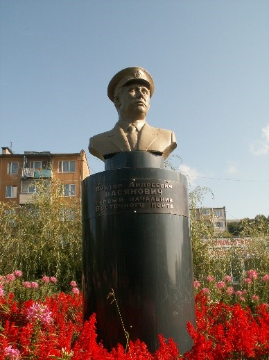 В 2008 году в честь В.А. Васяновича был открыт памятник